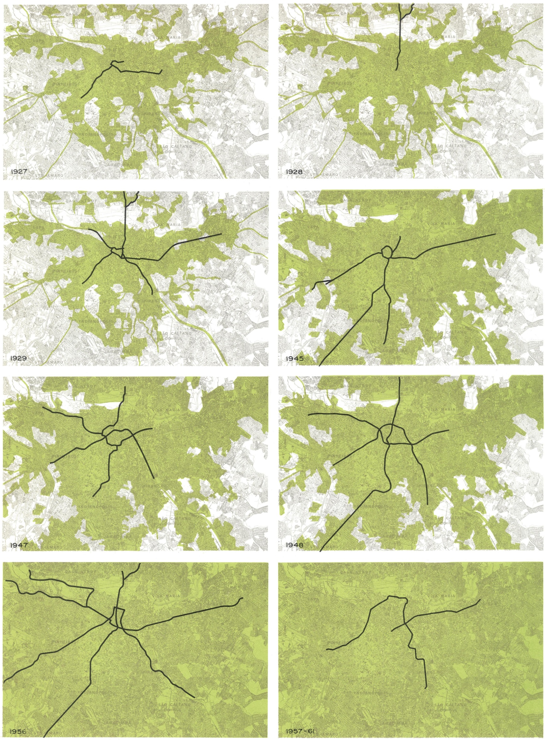 Mapas dos projetos de metrô projetados em São Paulo entre 1927 e 1961.